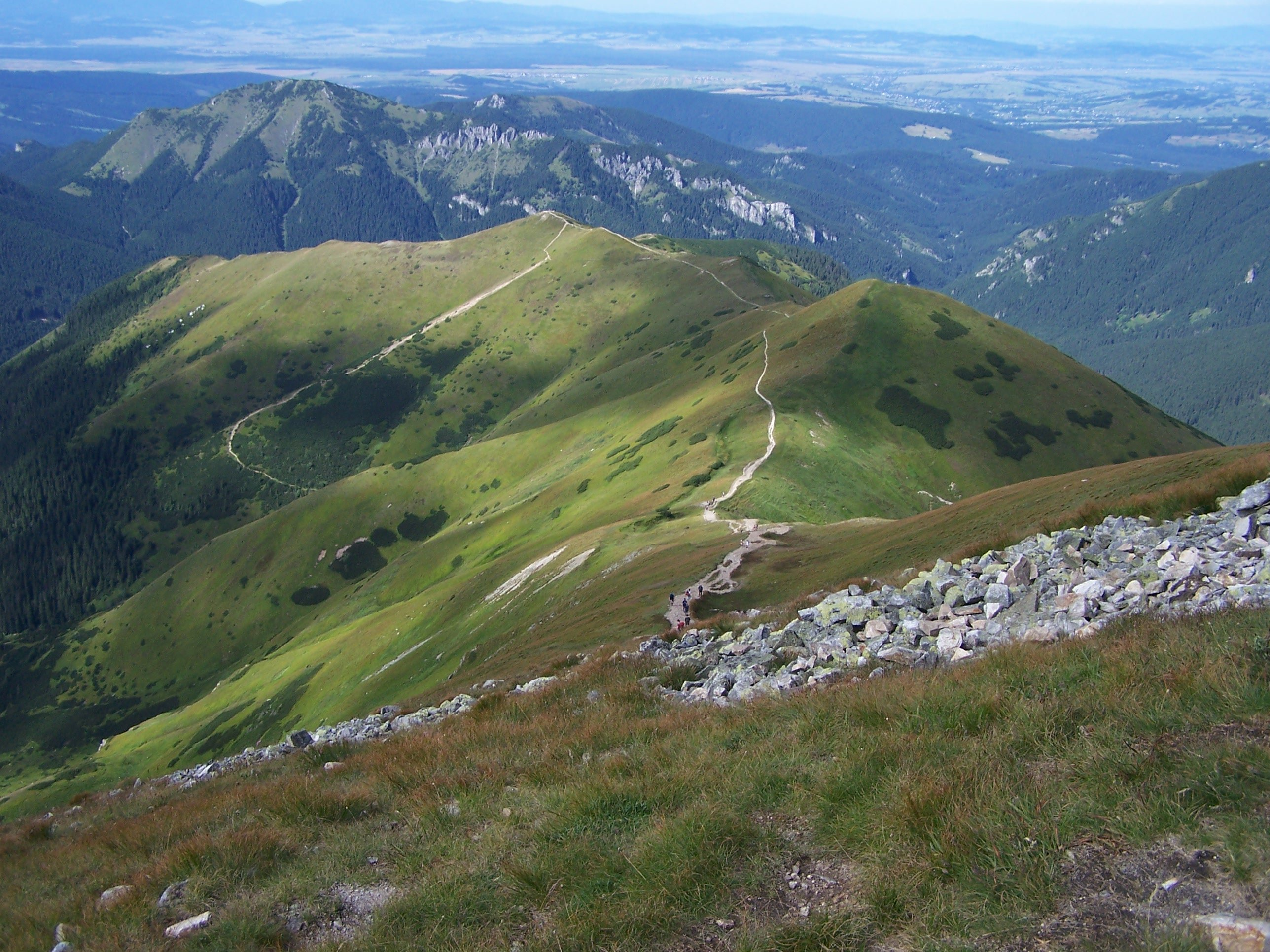 Trzydniowiański Wierch (Tatra Mountains)